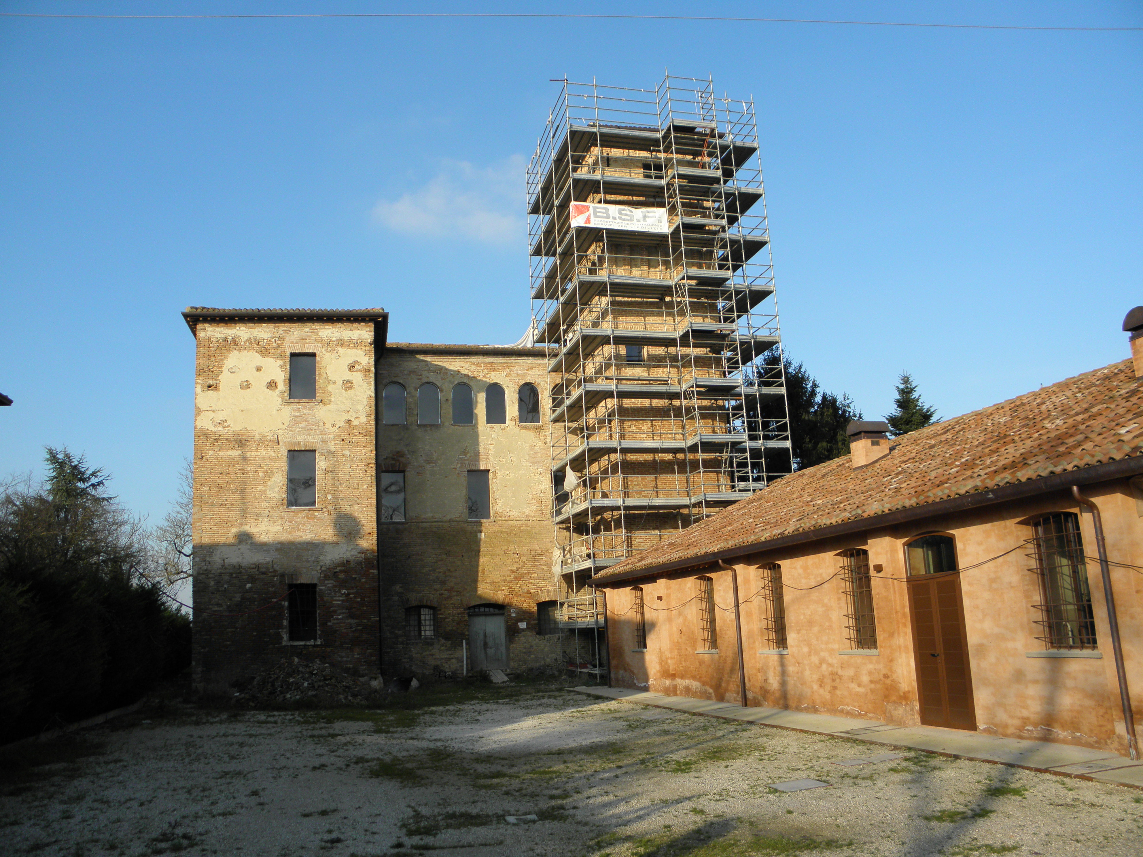 Tresigallo, Palazzo Pio in fase di ristrutturazione (dicembre 2014).